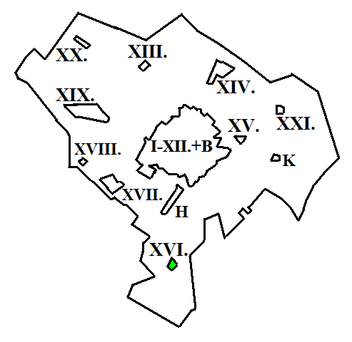 Kecskemét XIV. kerülete a térképen (Matkó)